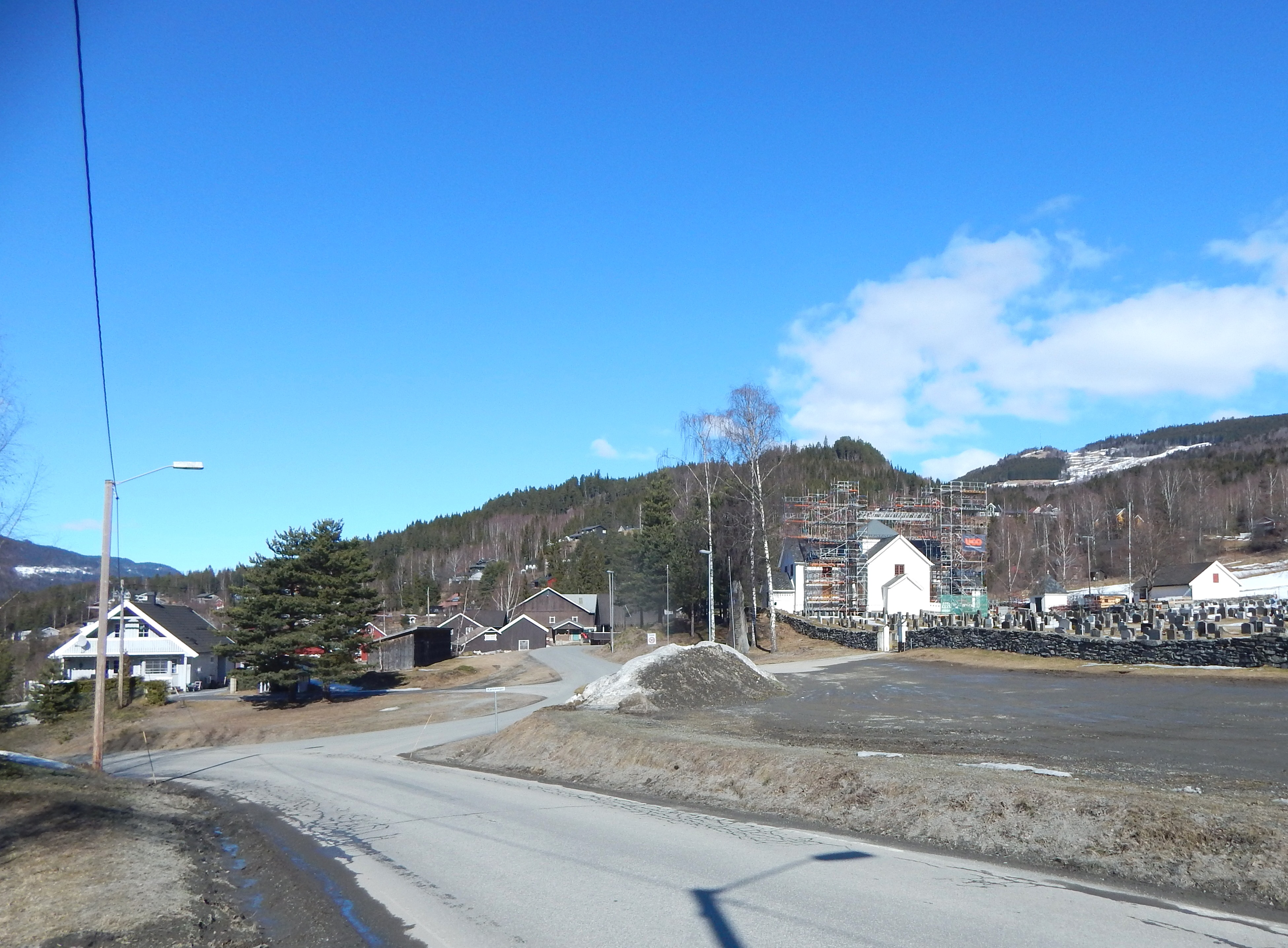 Sør-Trettenvegen (fylkesvei 358) ved Tretten kirke